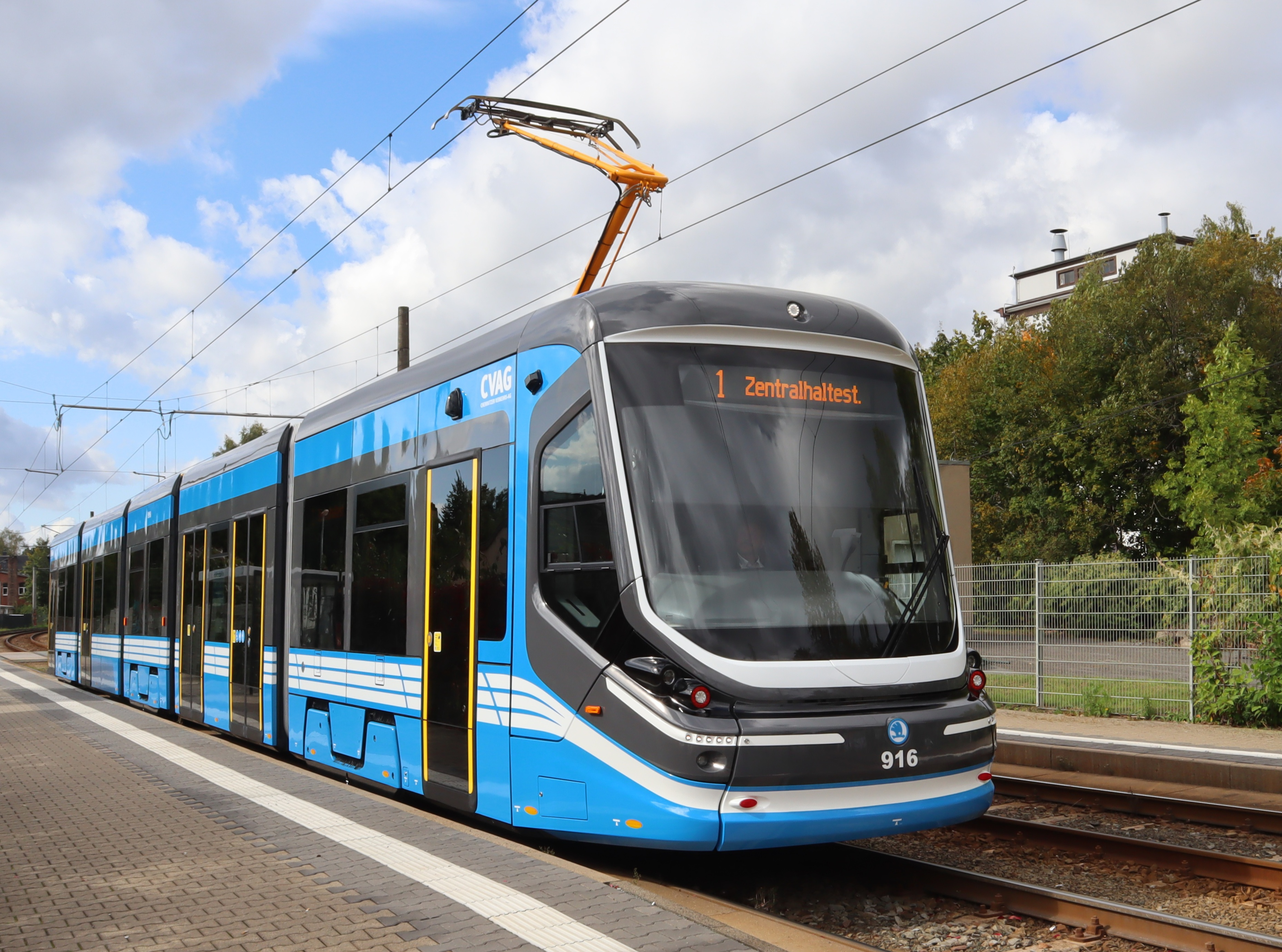 Skoda ForCity Classic (35T) der Chemnitzer Verkehrs-AG an der Haltestelle Am Feldschlösschen (Strassenbahnmuseum)